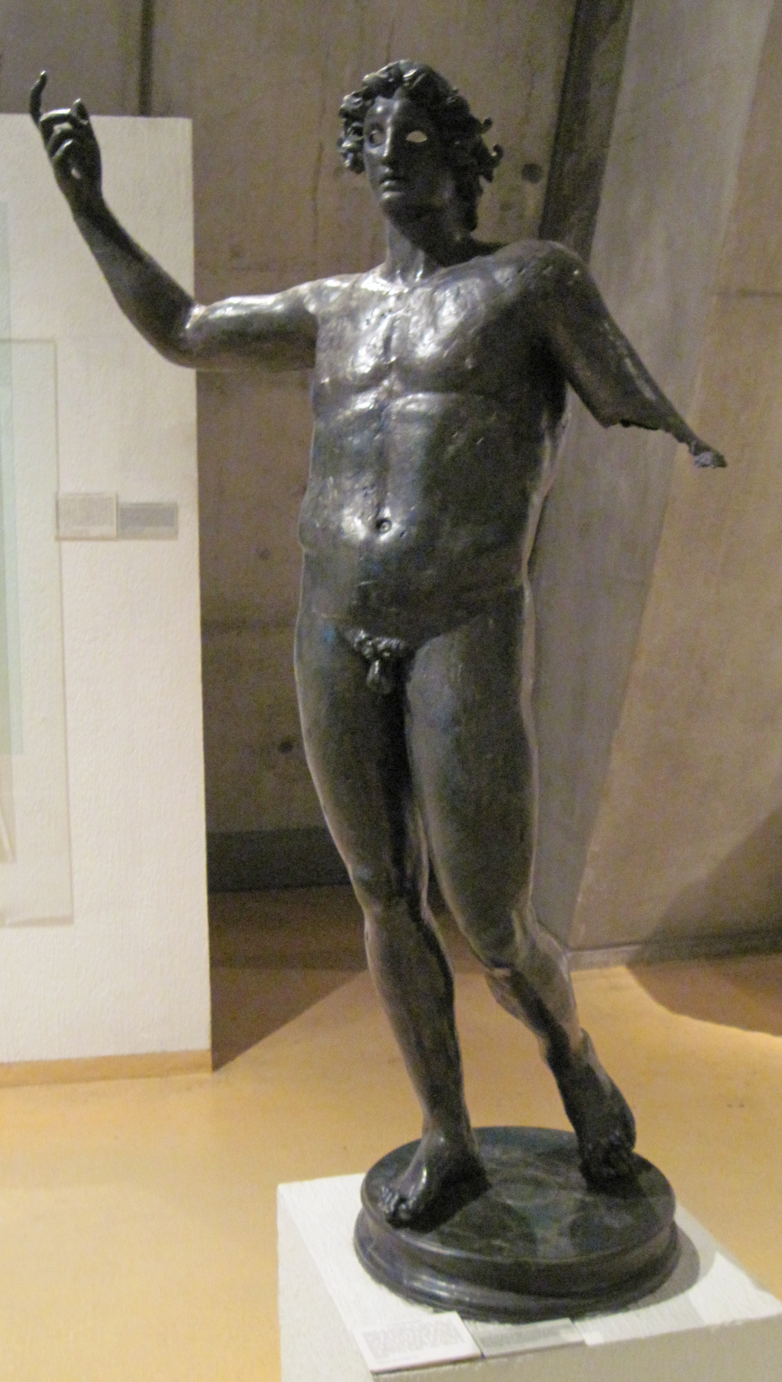 Interlingua: Le deo de Coligny (statua in bronzo).